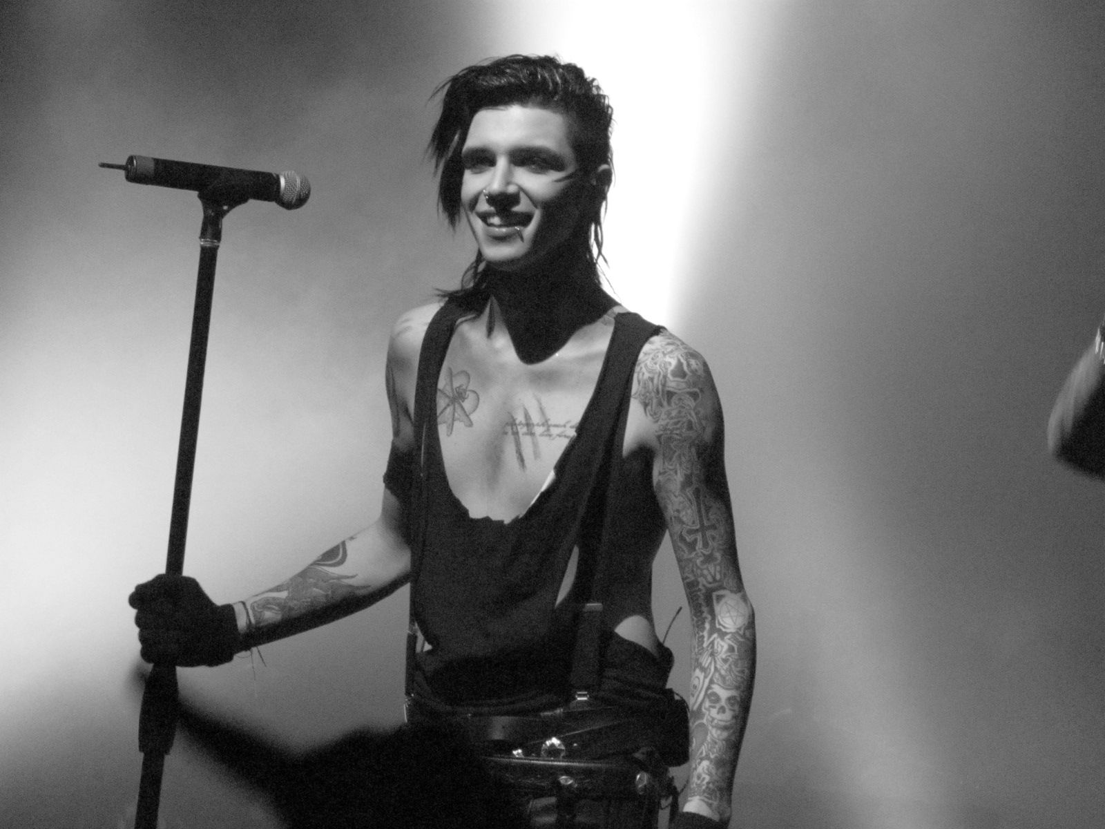 Concierto de la banda Black Veil Brides el 25 de enero de 2013 en Nueva York. En la imagen: Andy Biersack.